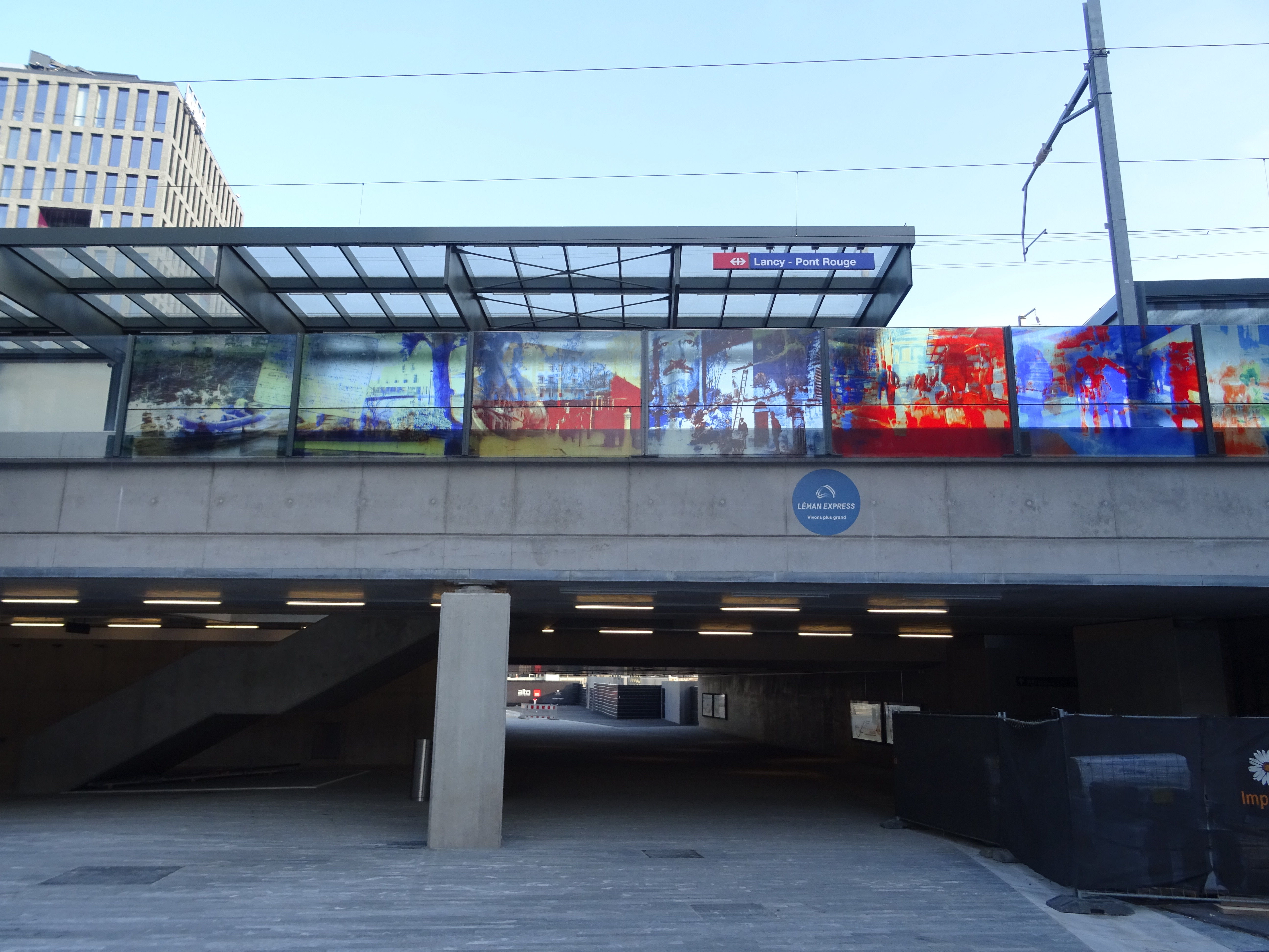 Vue de face de la gare de Lancy-Pont-Rouge depuis le niveau du sol.